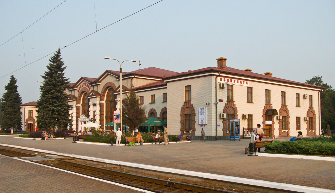 Вокзал станції Ясинувата-Пасажирська